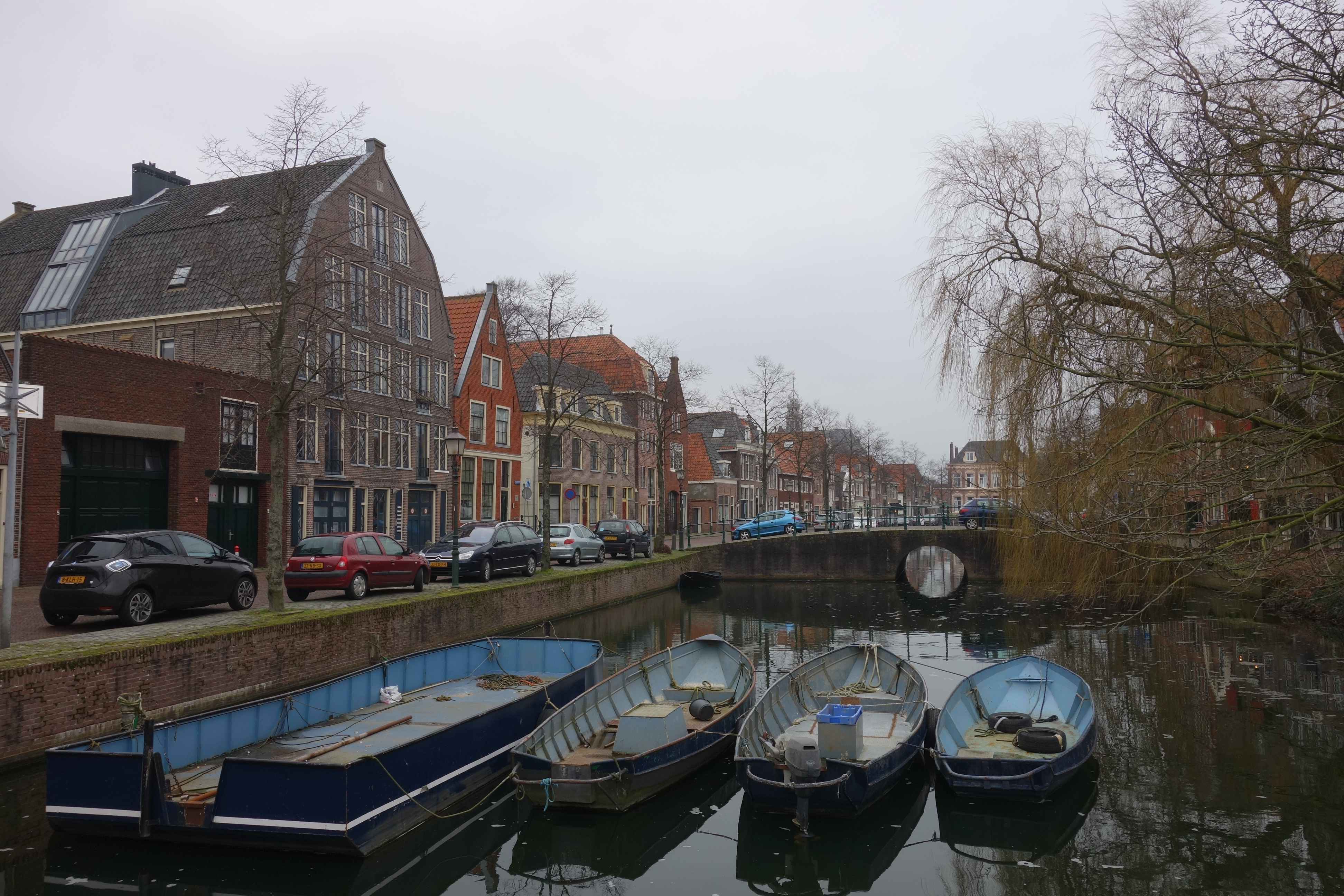 Overzicht van de Appelhaven in Hoorn. Zowel het water als de straat dragen de naam Appelhaven.